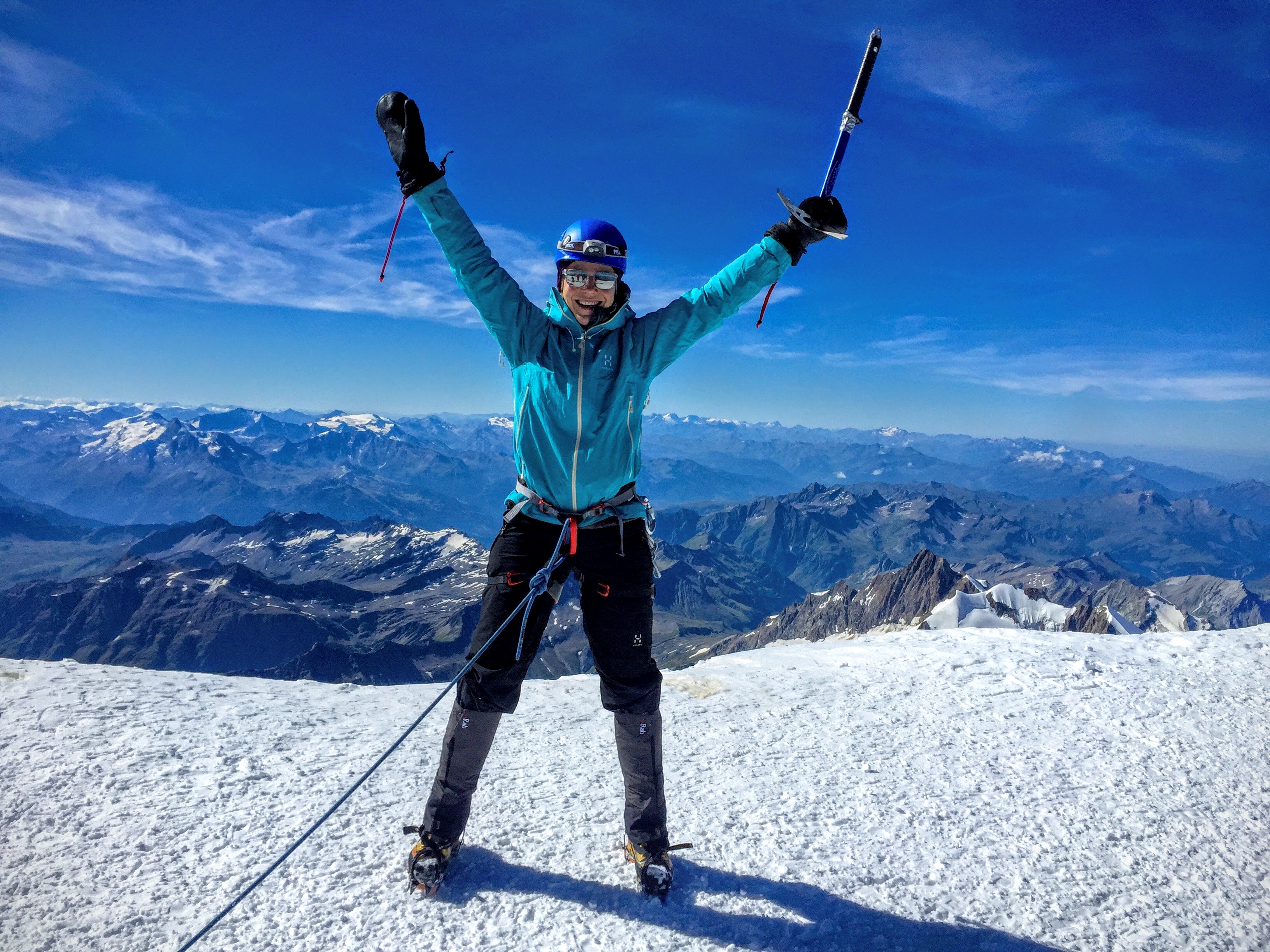 Vuorenvalloitus-blogin Janiina Kauppinen Mont Blancin huipulla vuonna 2016